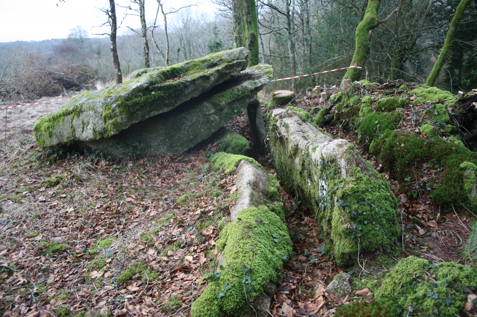 Photo de l'allée couverte de Keroual. Cernée d'un cairn avec une pierre tombale, dont la construction remonte de 2000 à 2500 ans avant Jésus-Christ, se situe à proximité du village de Keroual d'en Haut.